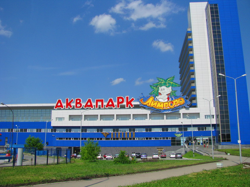 Аквапарк «Лимпопо» в Екатеринбурге - один из крупнейших крытых аквапарков России.